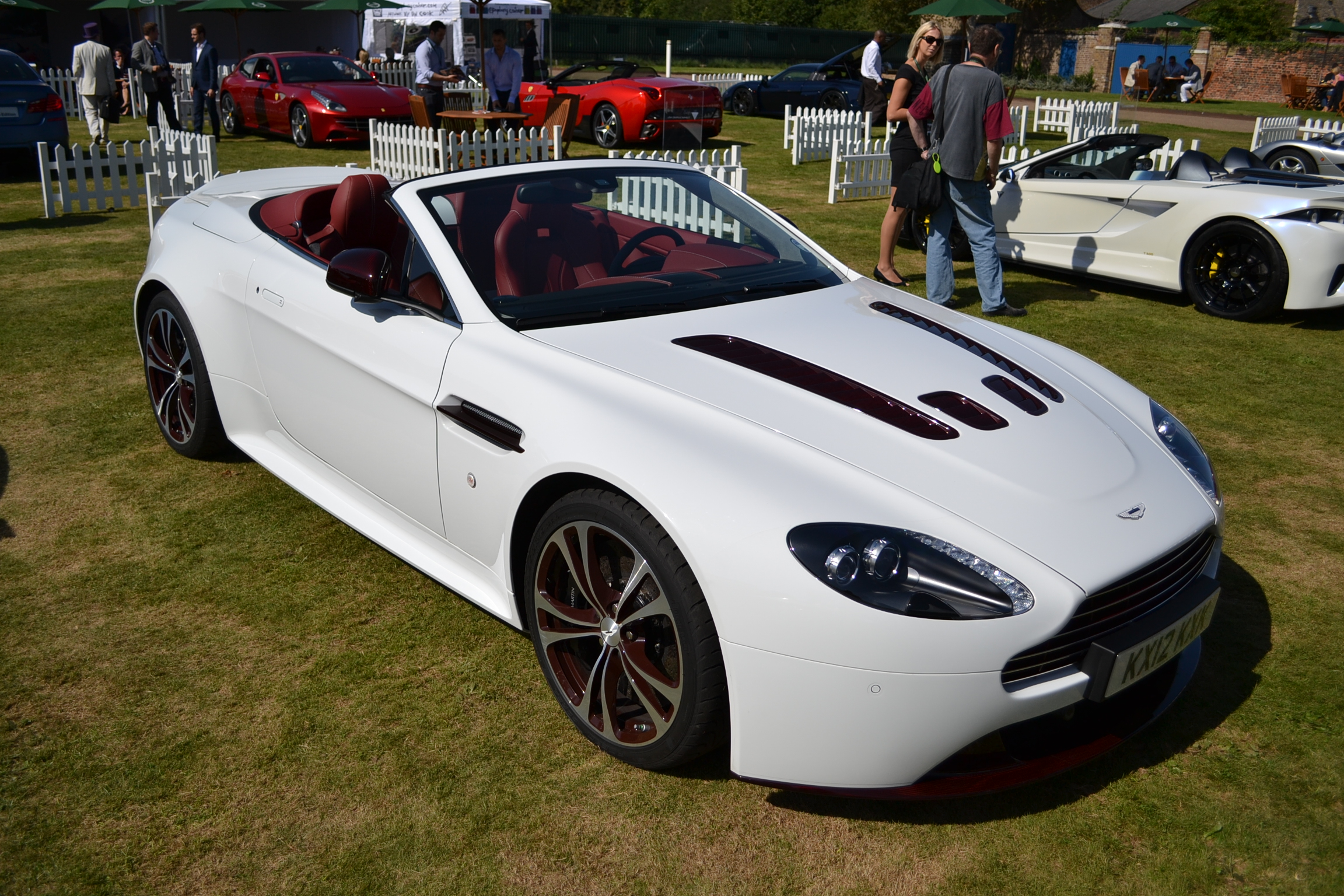 Salon Privé London 2012